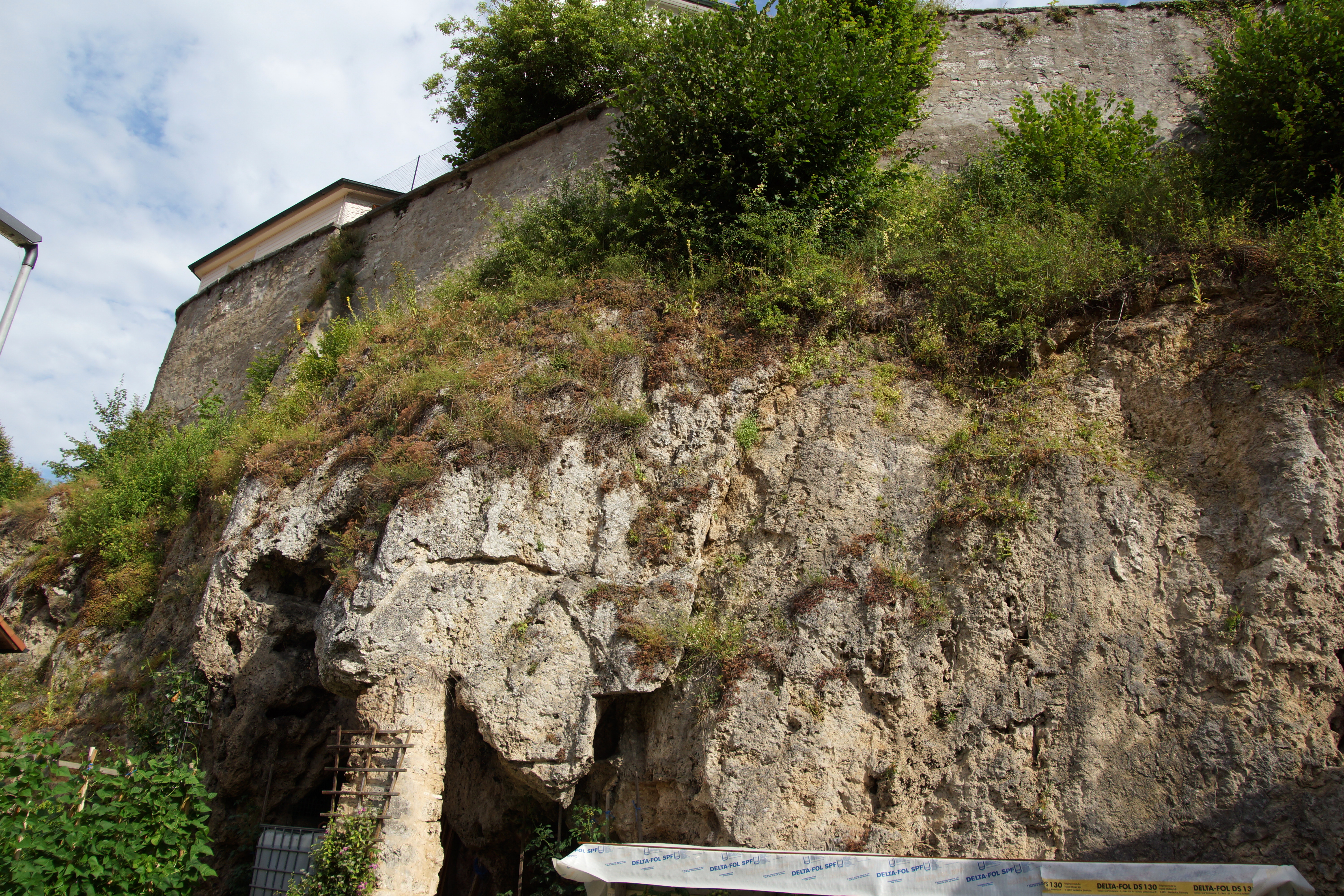 Holnstein bei Berching in der Oberpfalz